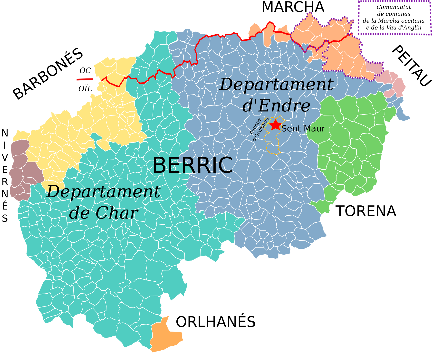 Limits provinciaus e lingüistics